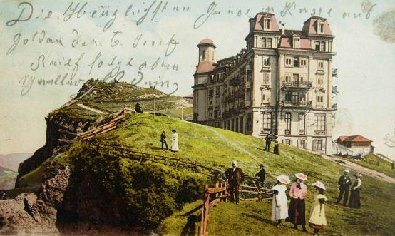 Carte postale Rigi 1906